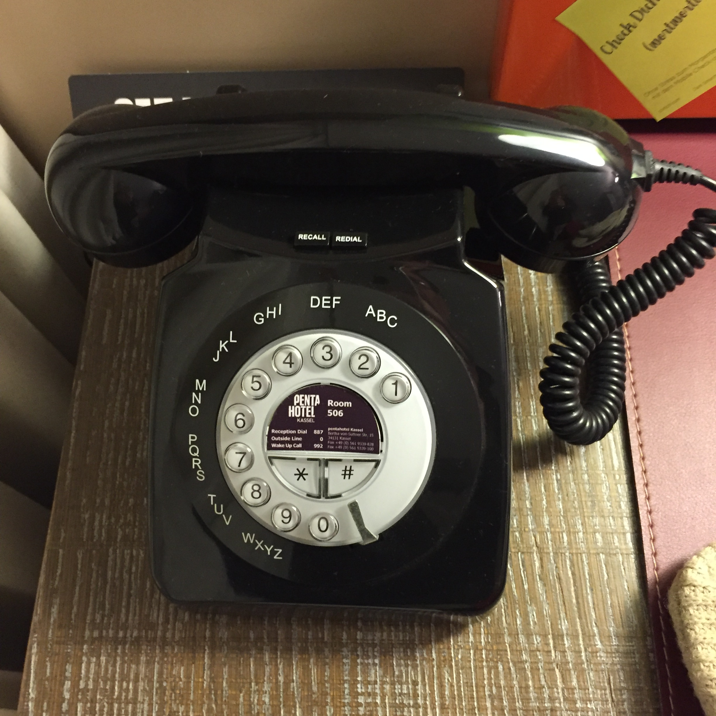 Tastentelefon im Wählscheibendesign